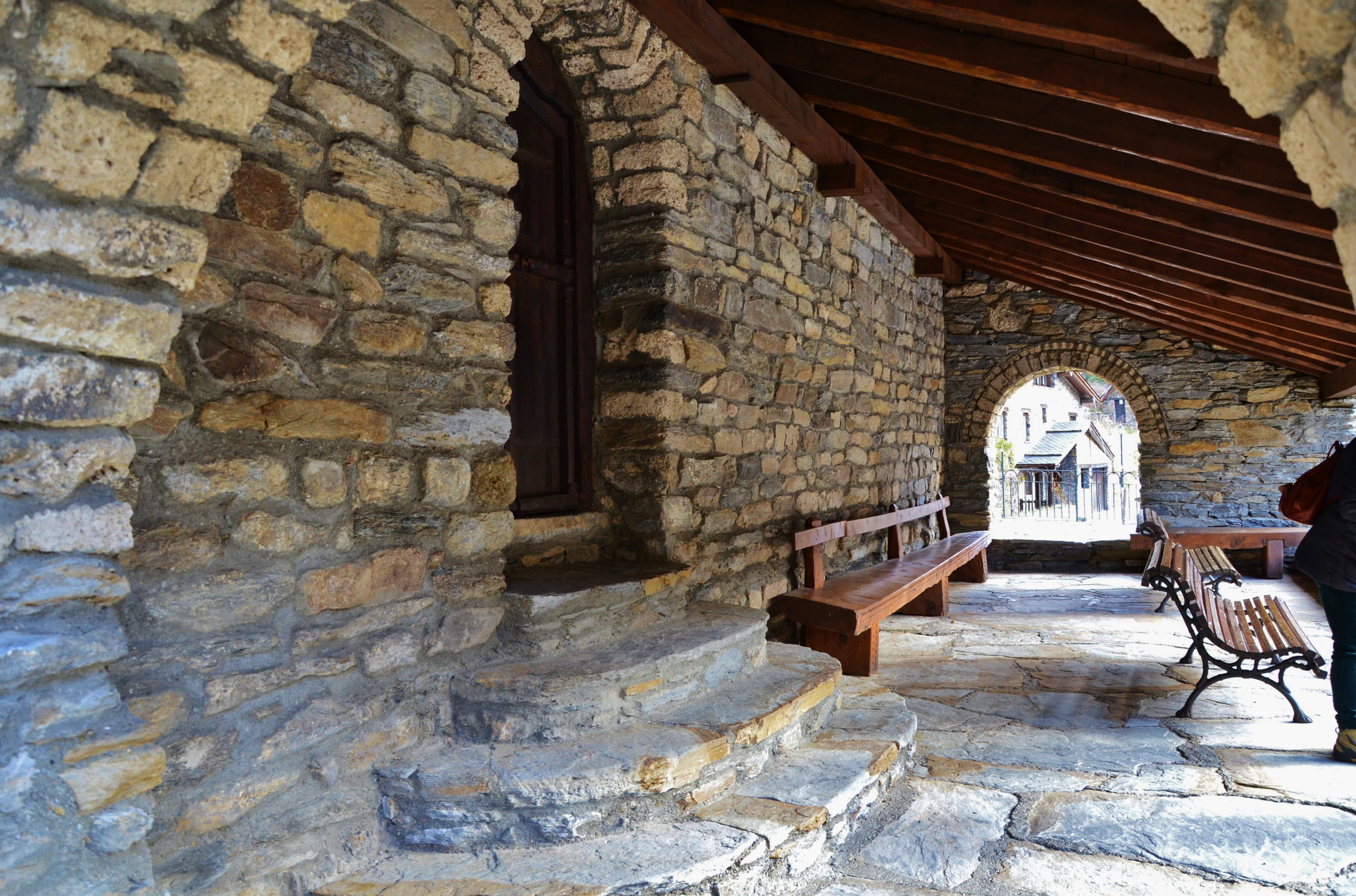 Església de Sant Climent de Pal